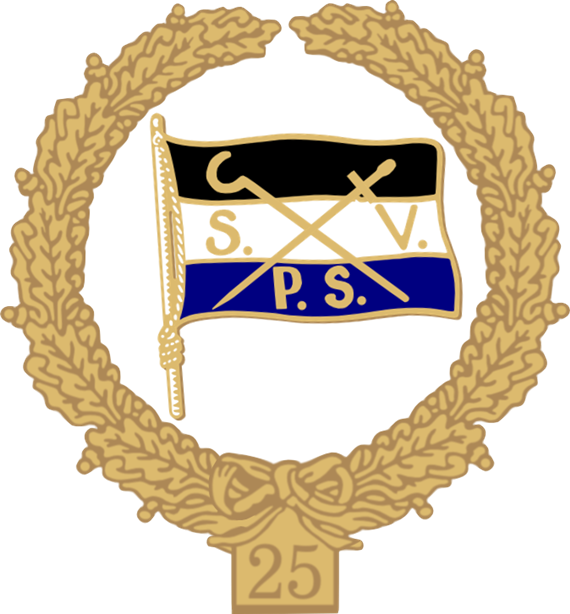 Jubiläumslogo des SV Prussia-Samland Königsberg